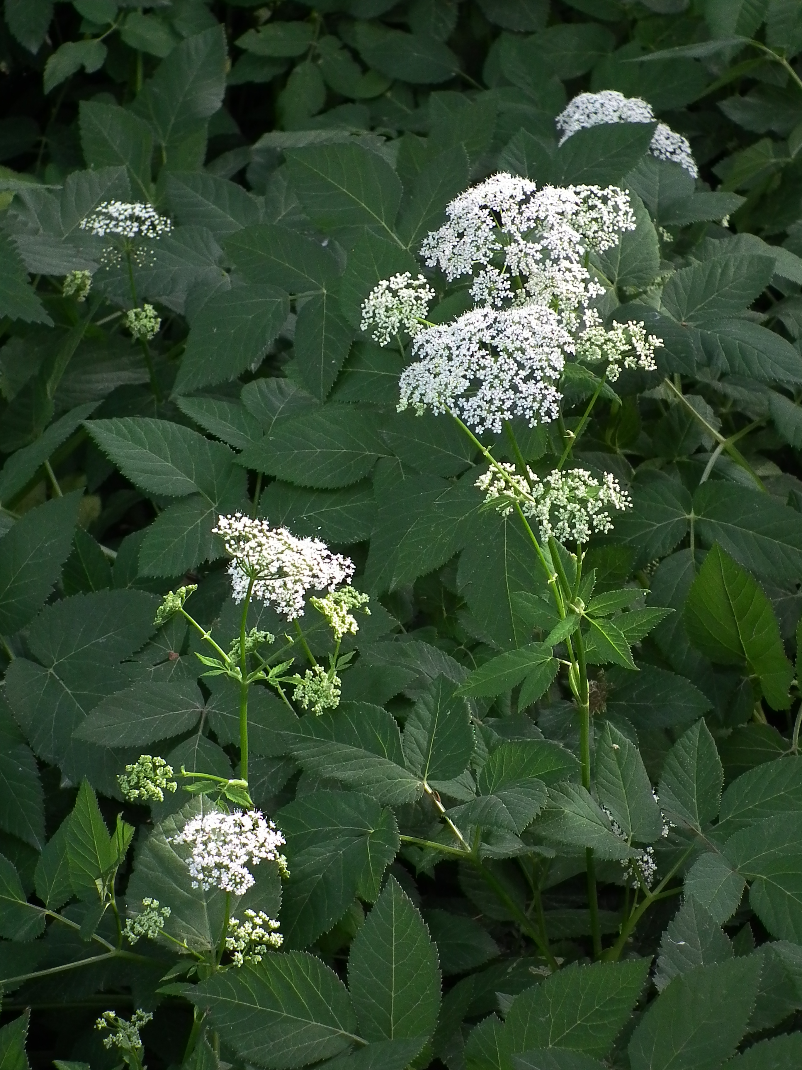 Giersch (Aegopodium podagraria), fotografiert in Heidelberg (Baden-Württemberg, Deutschland)